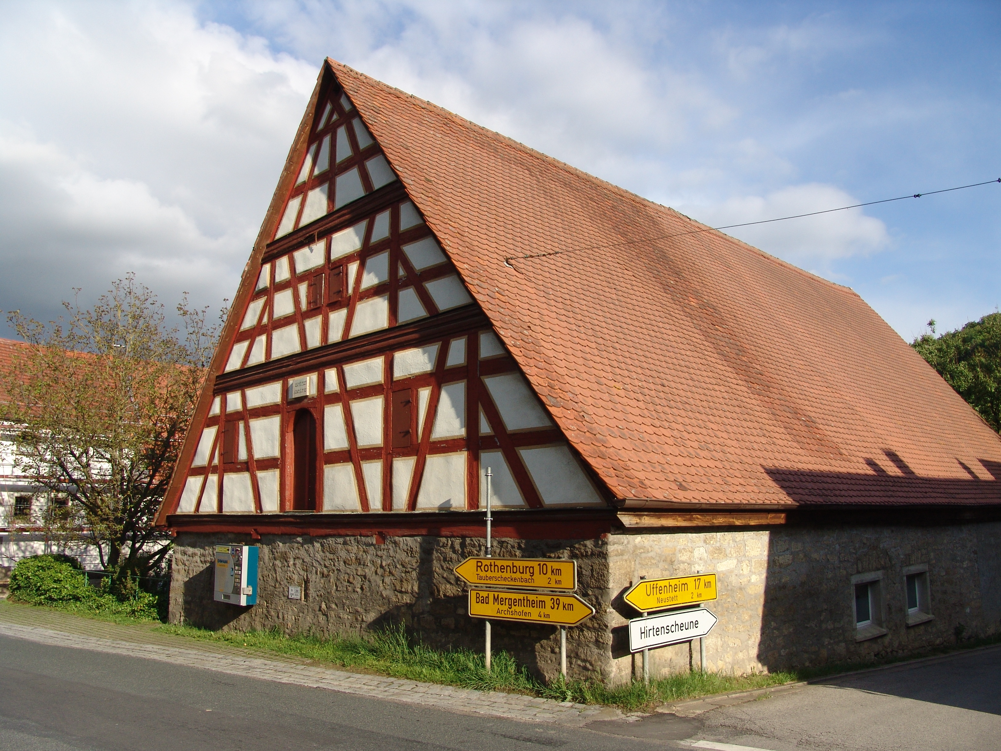 Tauberzell 9, Scheune